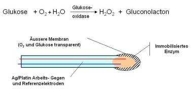 Chemische Reaktion des Enzyms Glukoseoxidase und Schema eines amperometrischen Nadelsensors